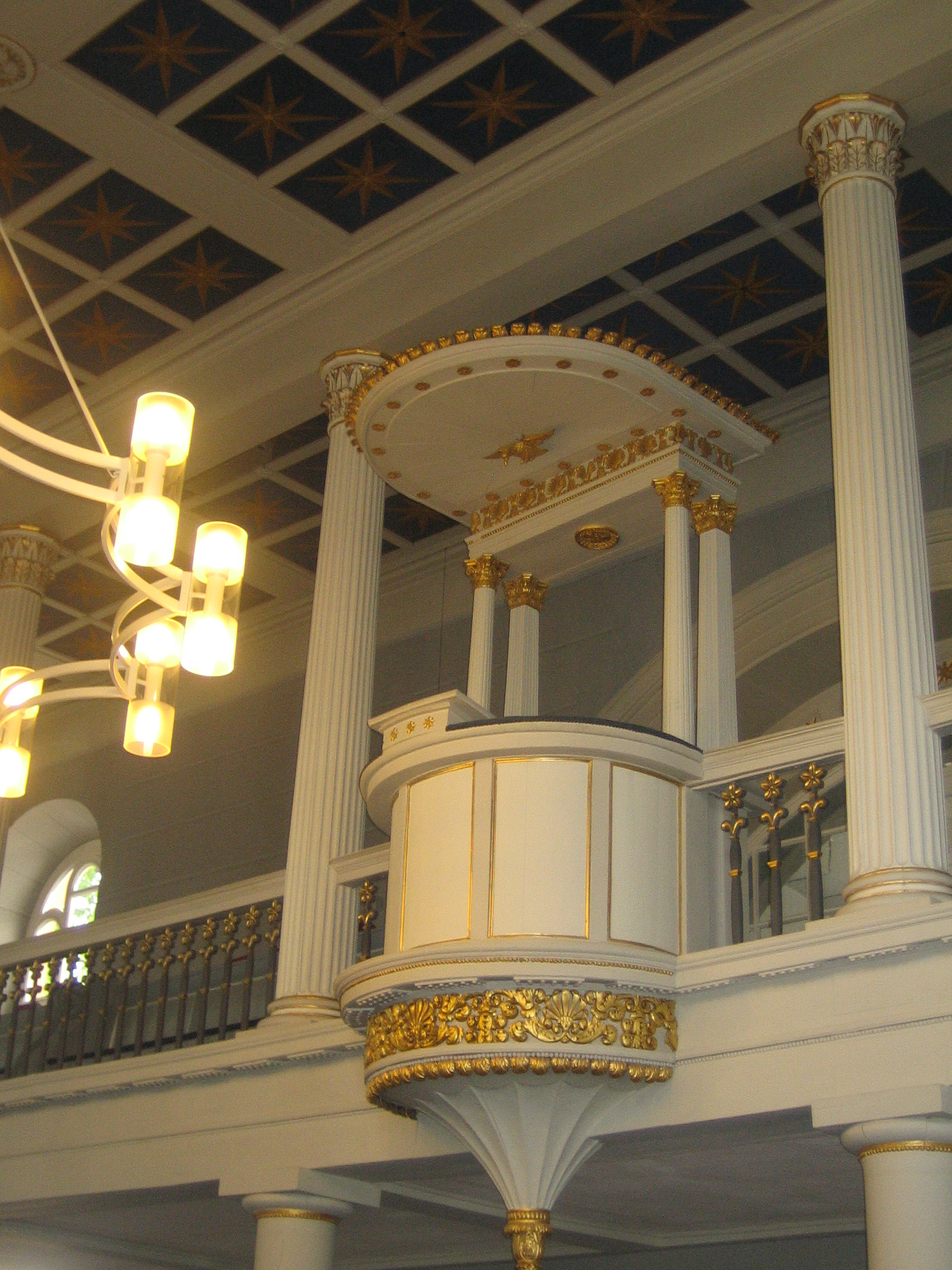 Evangelische Pfarrkirche Wißmar - Kanzel